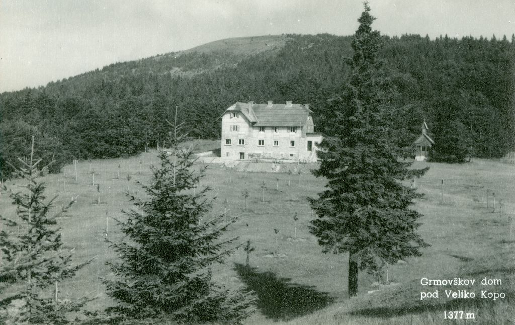 Razglednica Grmovškovega doma pod Veliko Kopo.